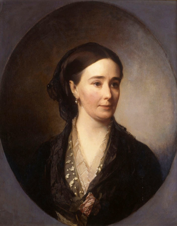 Elżbieta z Meyendorffów Hutten Czapska (1833-1916) - polska numizmatyczka